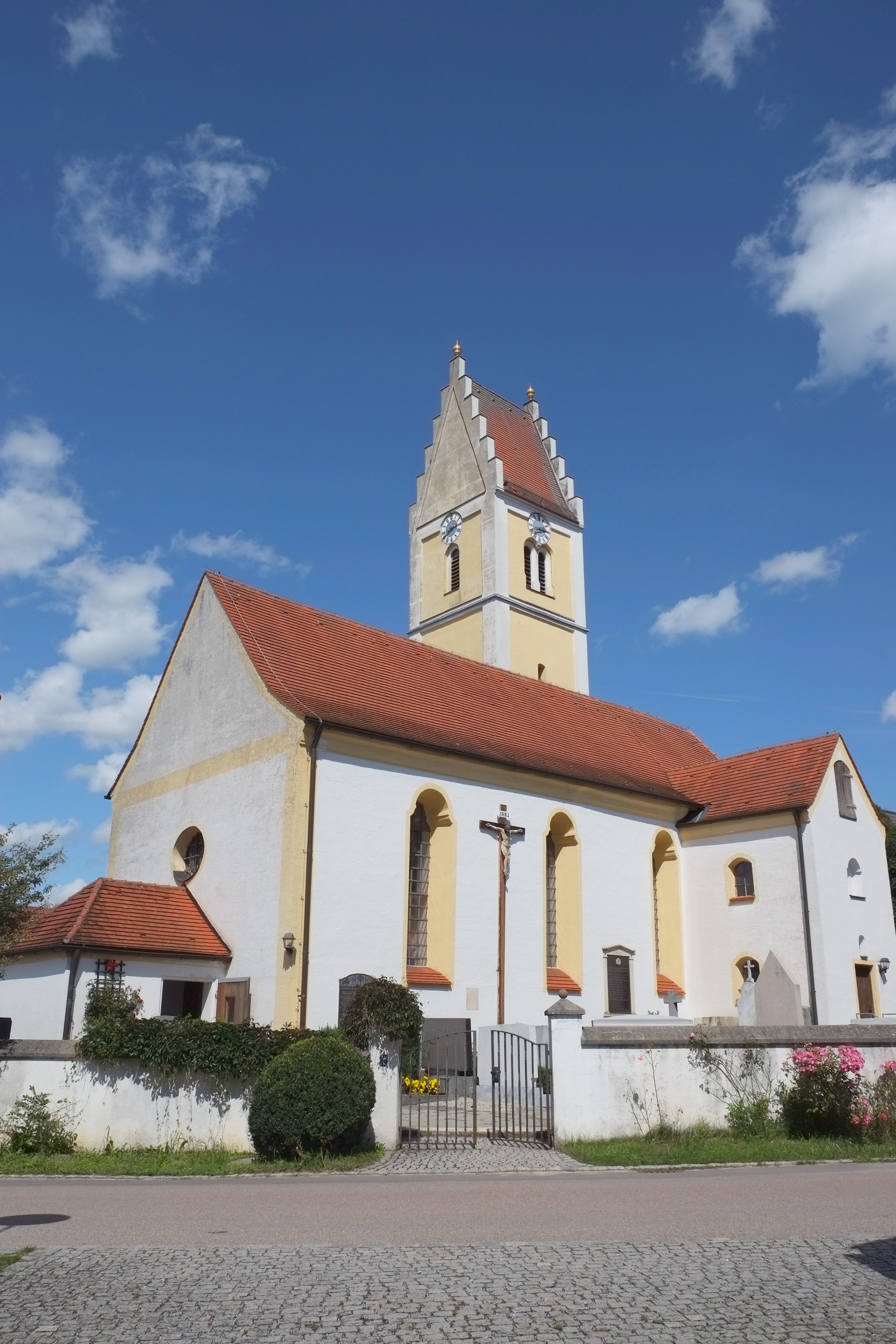 Katholische Pfarrkirche St. Dionysius in Pipinsried, einem Ortsteil von Altomünster im Landkreis Dachau (Bayern, Deutschland)